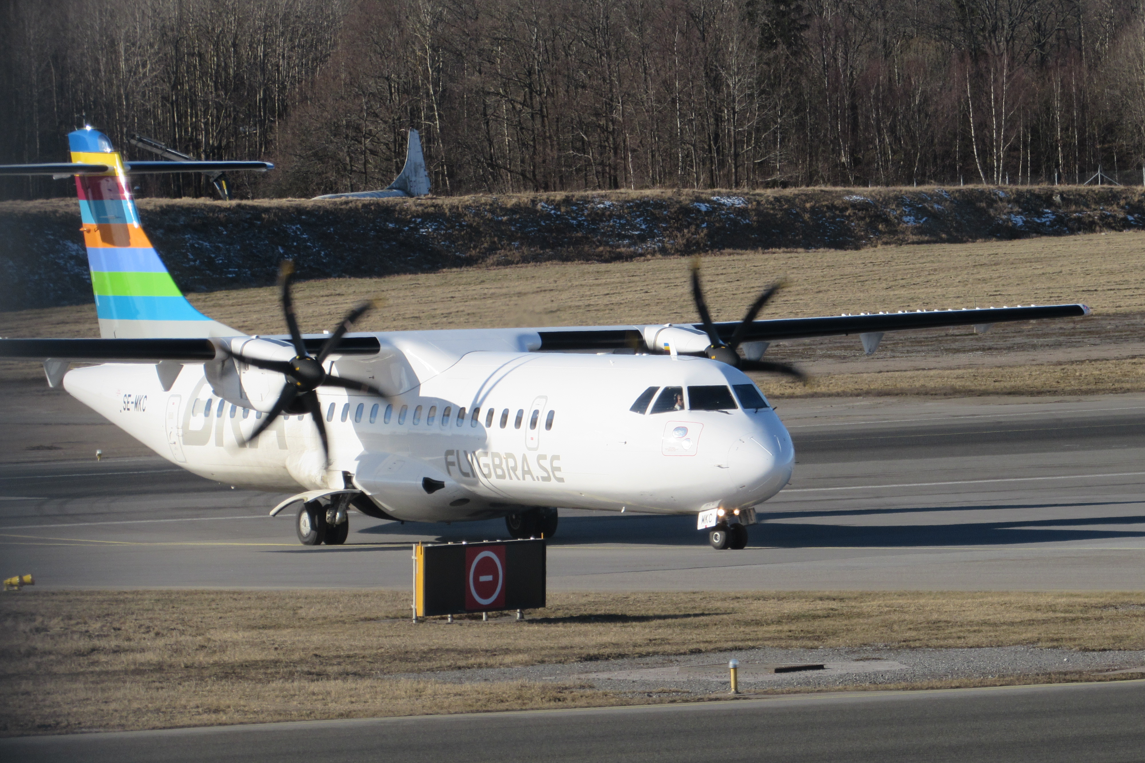 Ett av flygbolagets ATR72-600 på Bromma Flygplats Bild: Piloten